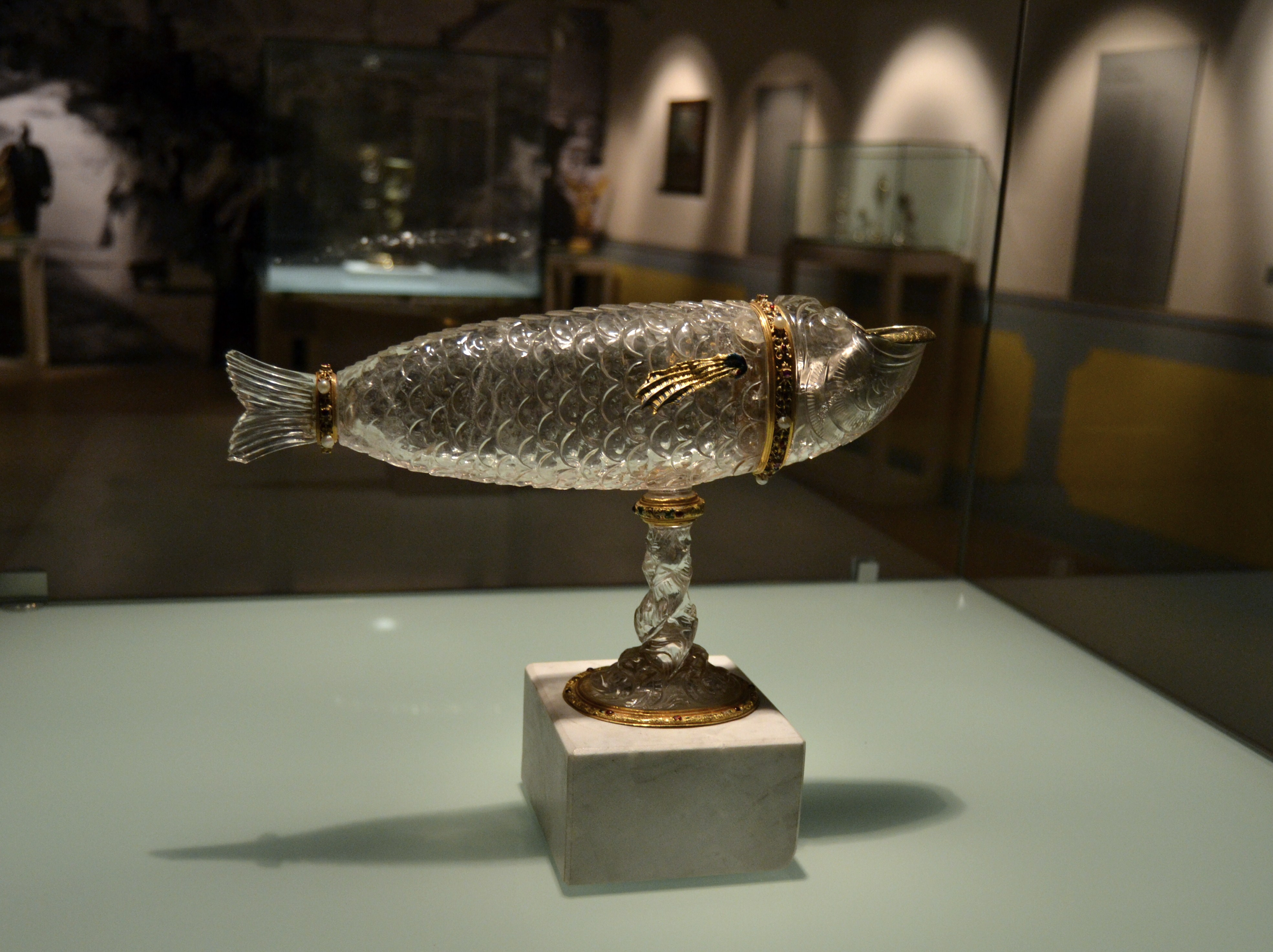 Naveta amb forma de peix, segle XVI, anònim (Venècia o Milà), cristall de roca tallat, or, esmalts i pedres precioses. Museu Diocesà d'Albarrasí.